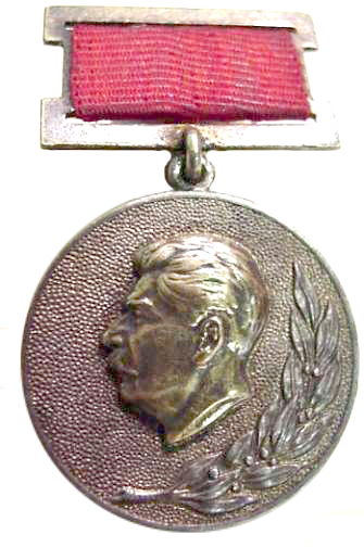 Stalin Priz Medal